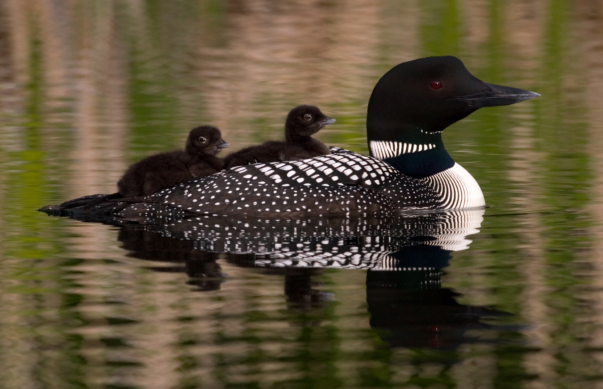 Glacier Loons